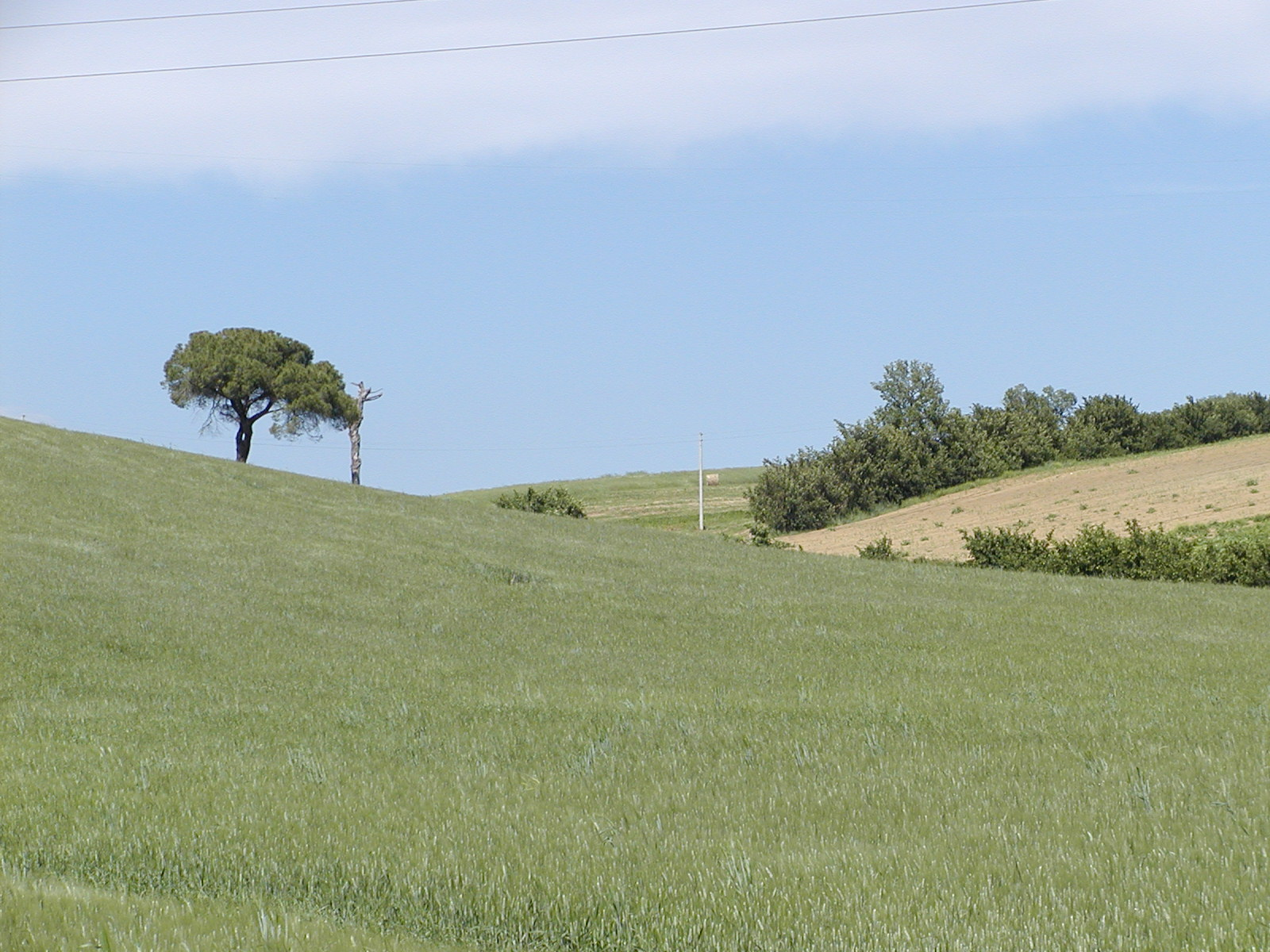 Landschaft irgendwo in der Toskana, Italien